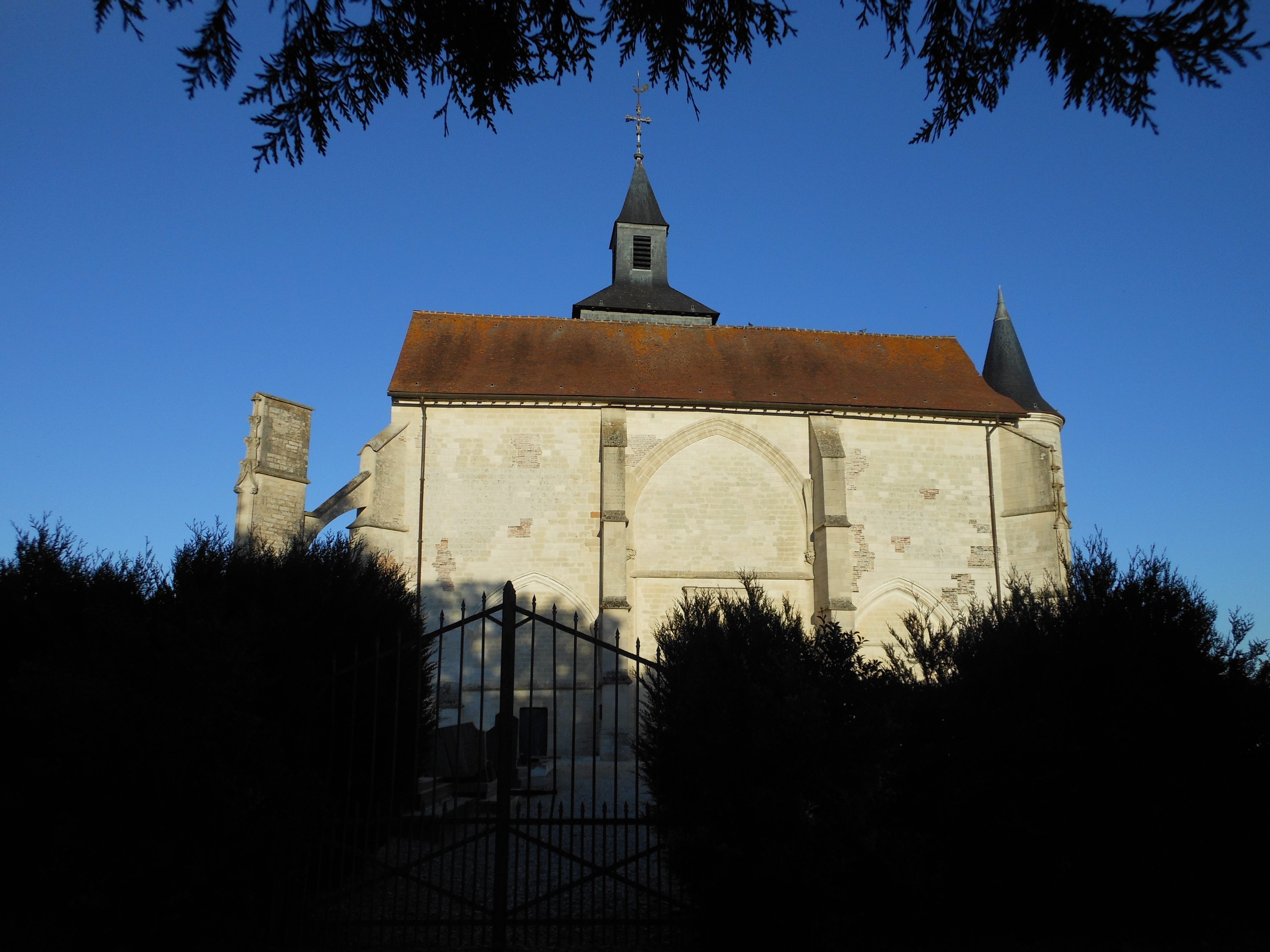 Église Saint-Ferréol, (Classé, 1931) .